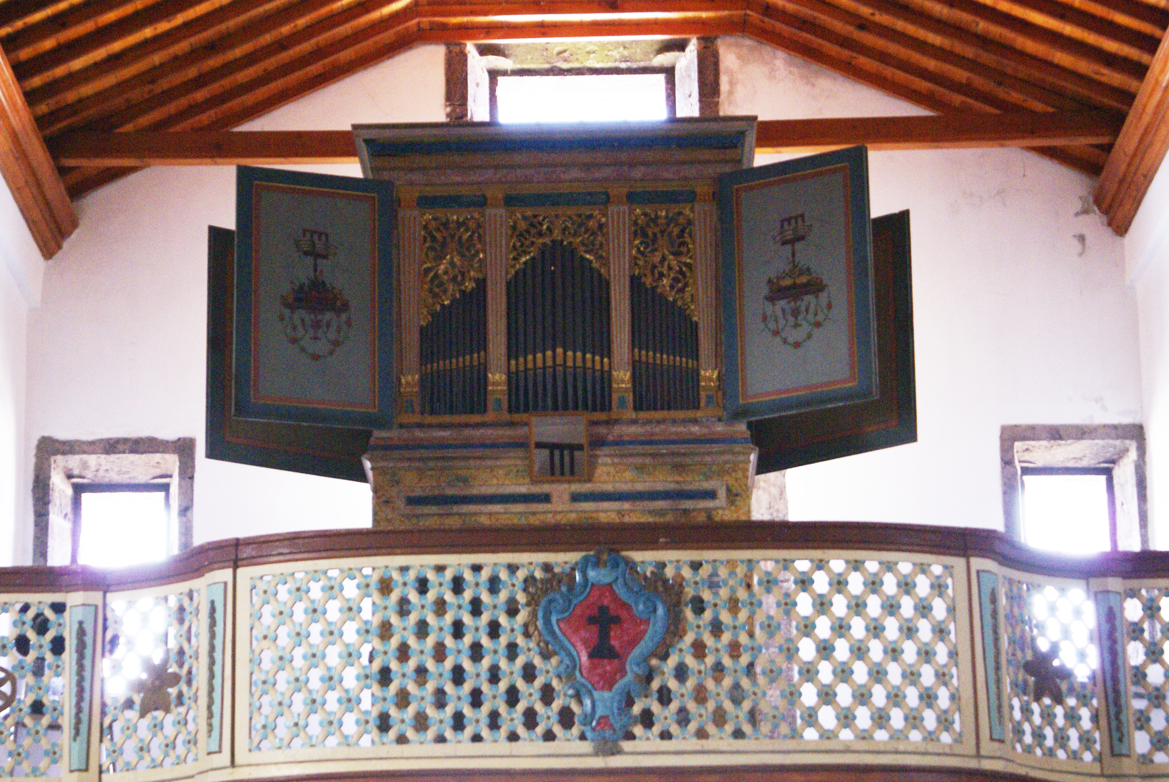 Igreja Matriz de Santa Cruz, Orgão de tubos, Santa Cruz da Graciosa, ilha Graciosa, Açores, Portugal